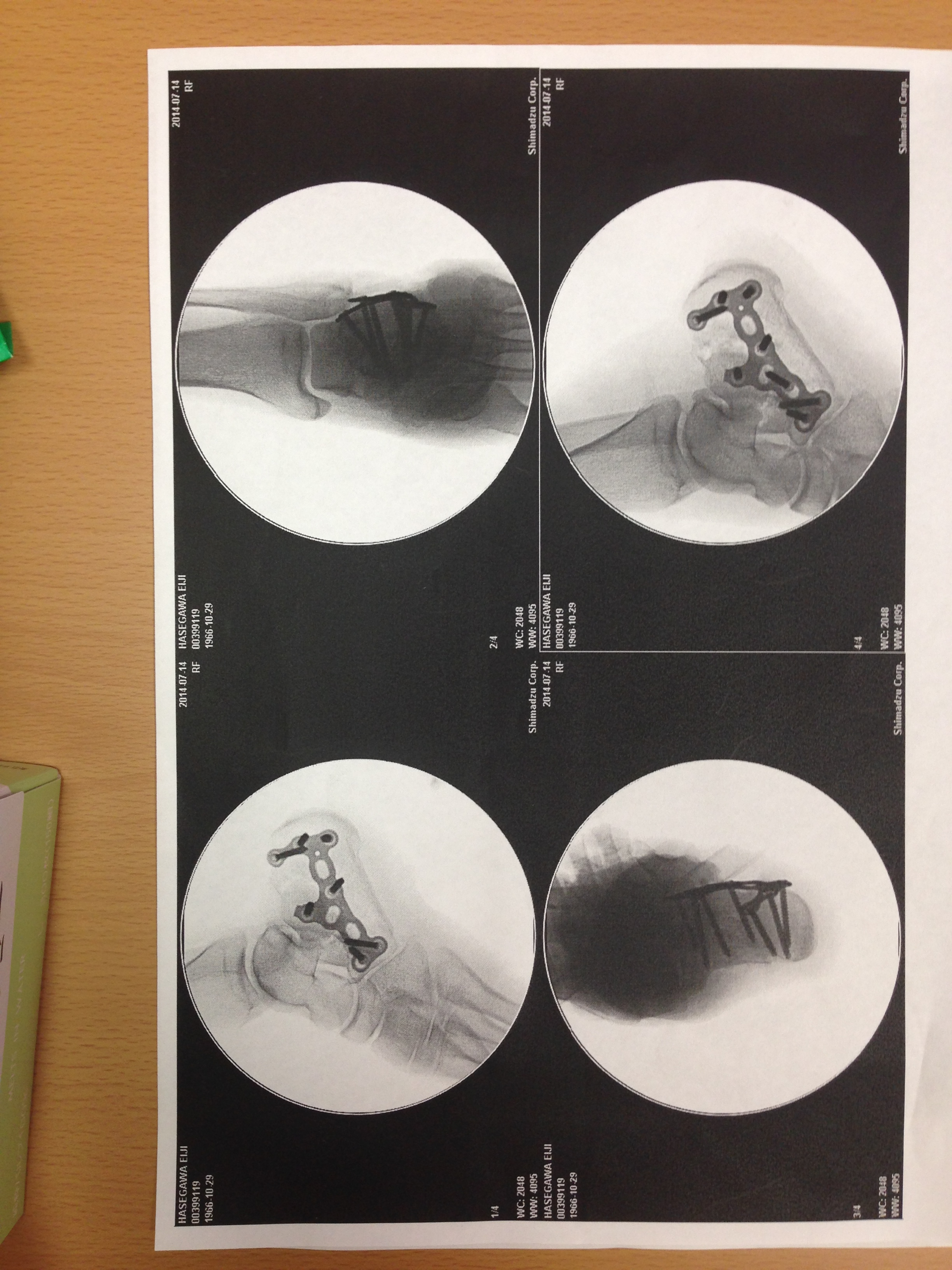 外科的手術によるプレート装着